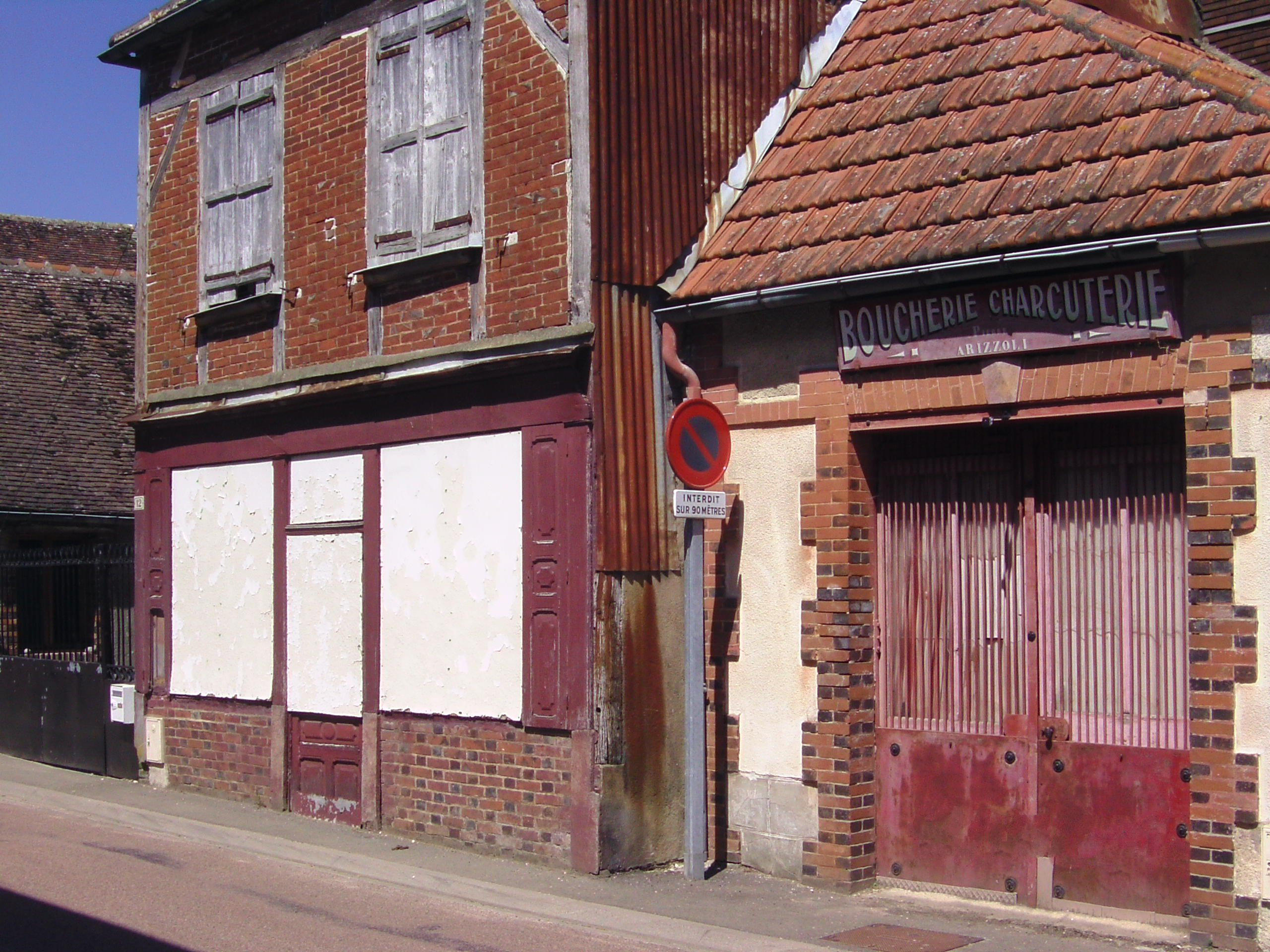 Vieille maison de cudot, ancien commerce